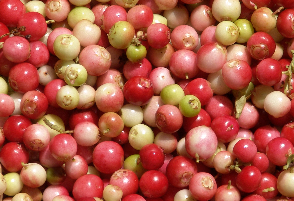 Reife und unreife Preiselbeeren in einem Sammelbehälter